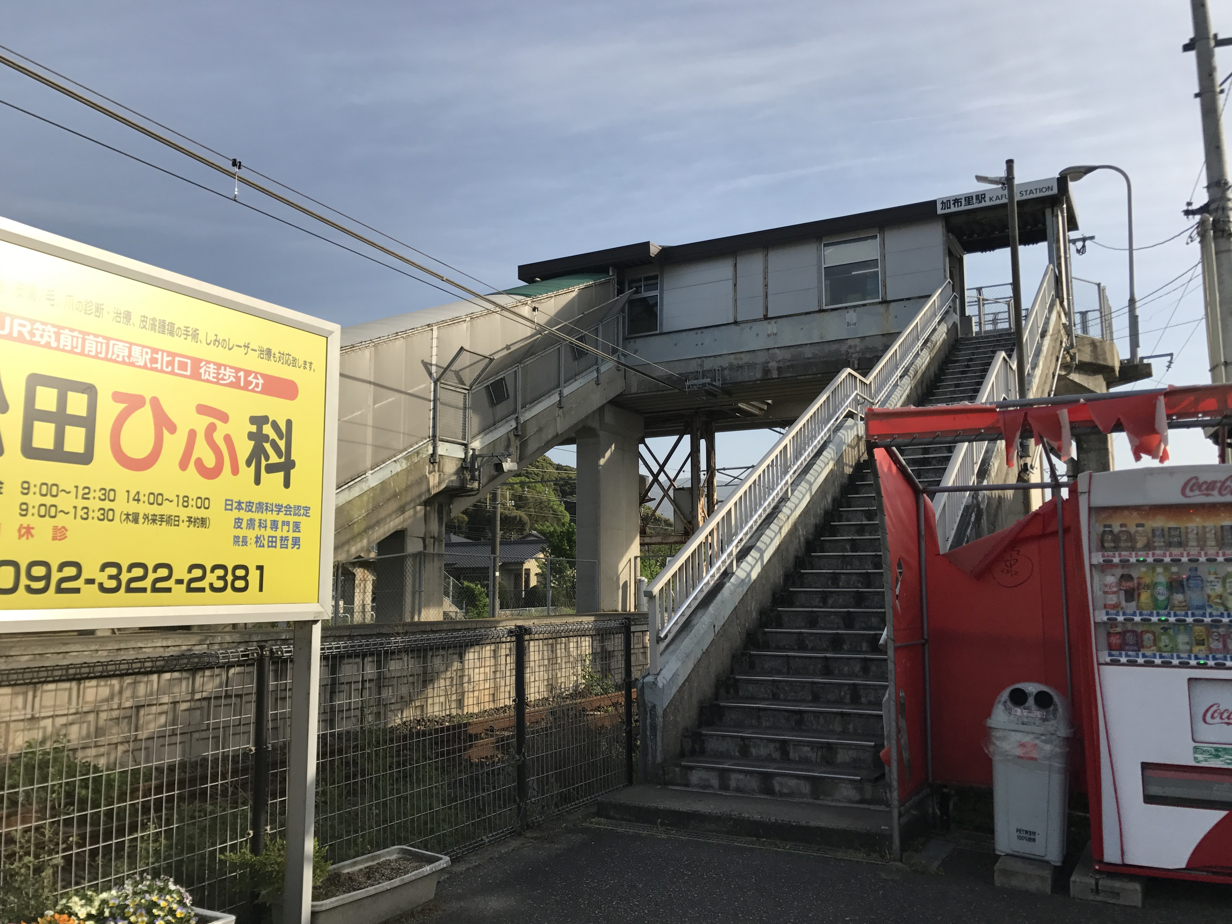 加布里駅駅舎